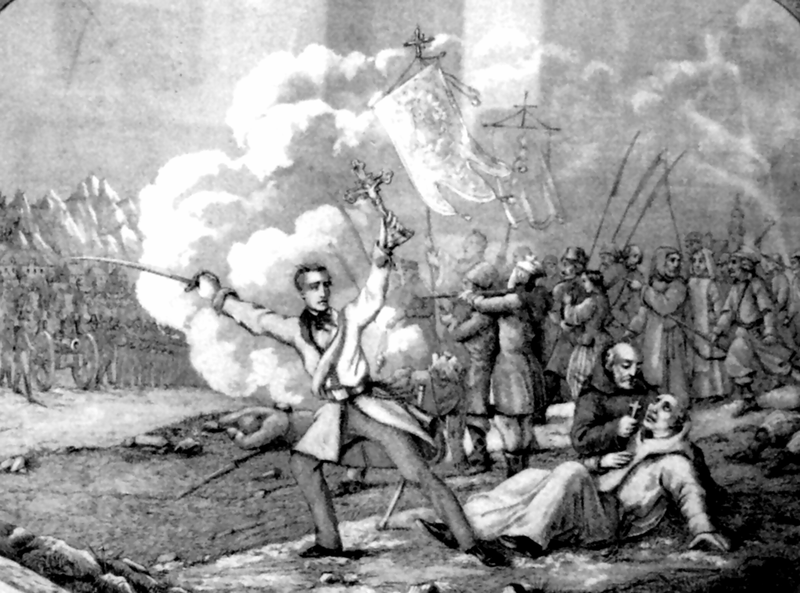 скачено